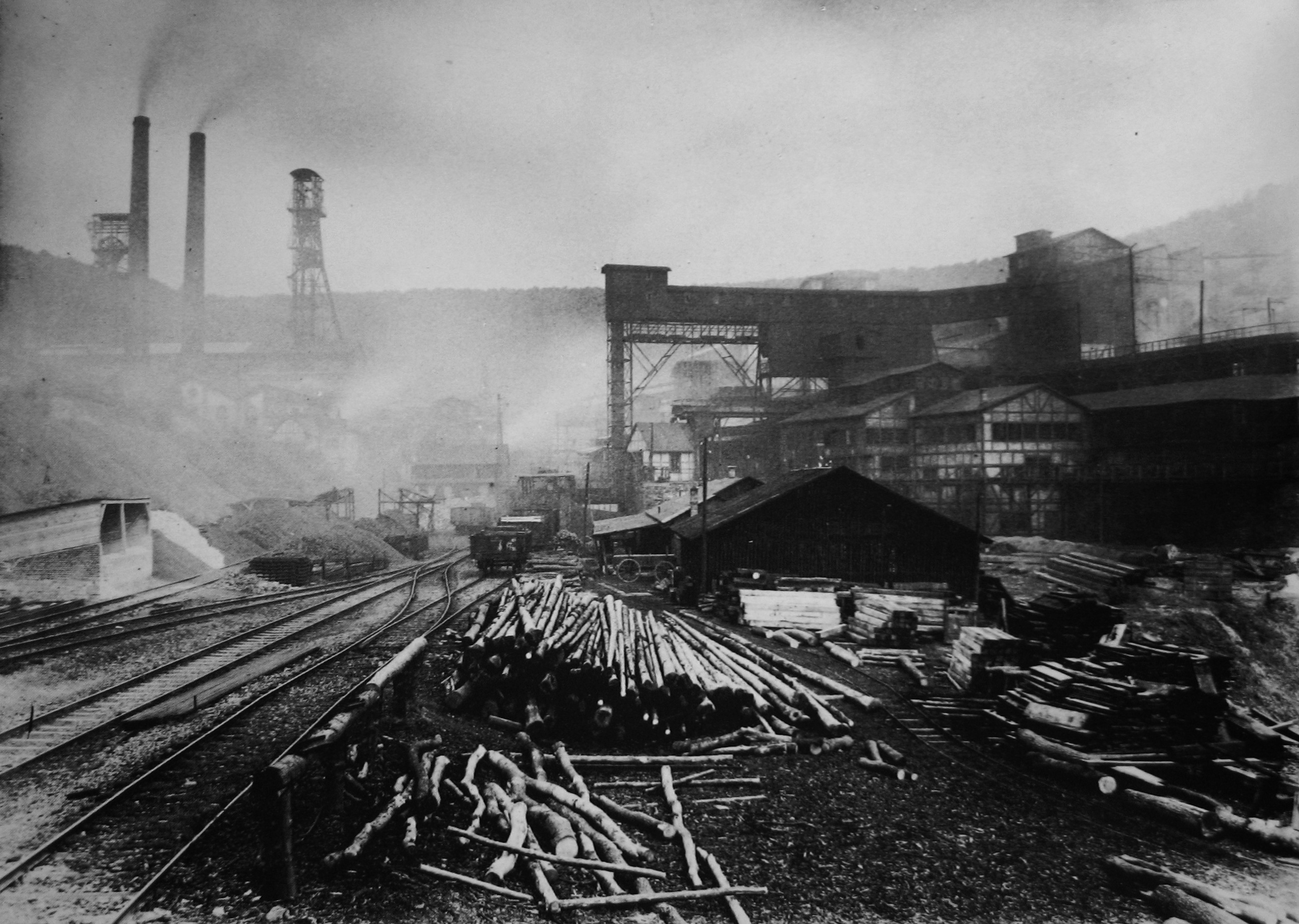 Tagesanlagen der Grube Eisenzecher Zug im Kesselborntal bei Eiserfeld. Die dargestellten Fördergerüste wurden 1910 errichtet.